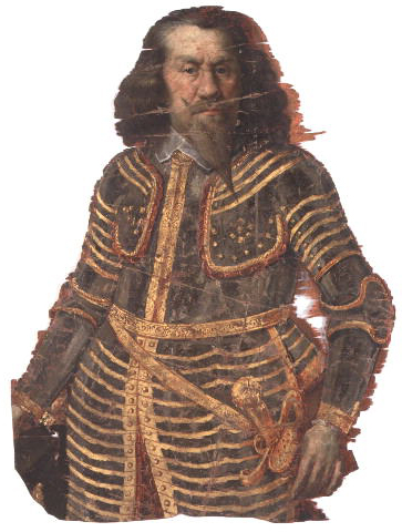 Diese beidseitig bemalte Bahrfahne, die Jan von Werth mit Feldherrenstab und goldgestreifter Kürassier-Rüstung in Halbfigur zeigt, wurde von seinem Dragoner-Regiment gestiftet. Sie hing bei der feierlichen Beerdigung des Johann Reichsfreiherrn von Werth im September 1652 als Dekoration in der Schloßkirche von Benatek. Er hatte es aus kleinsten Verhältnissen zum Feldherrn und Reichsfreiherrn mit eigenem Schloß gebracht - das Motto Napoleons "vom Marschallstab im Tornister" vorwegnehmend.